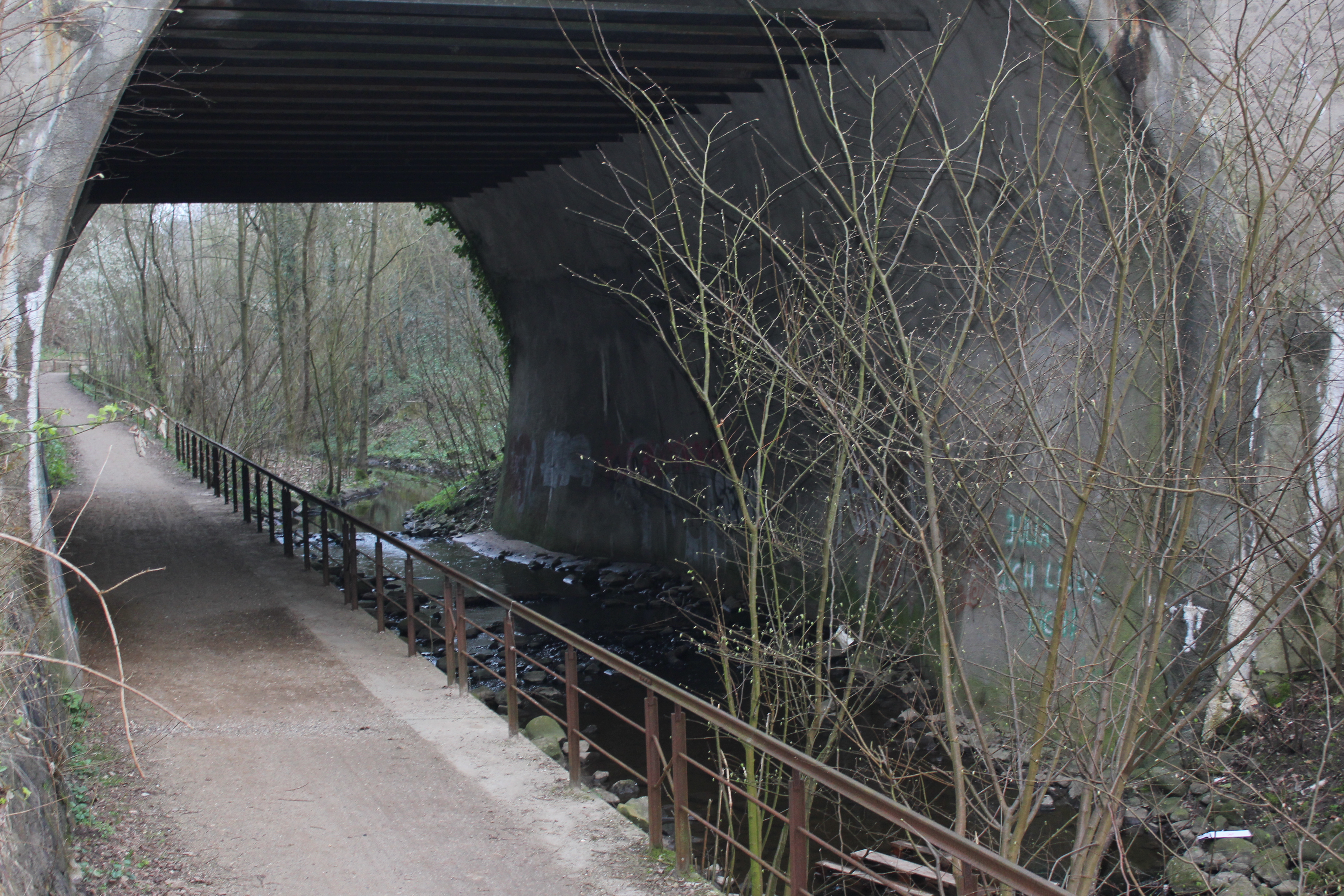 Das Teufelsloch der Teufelsbrücke (Flensburg 2014), Bild 008